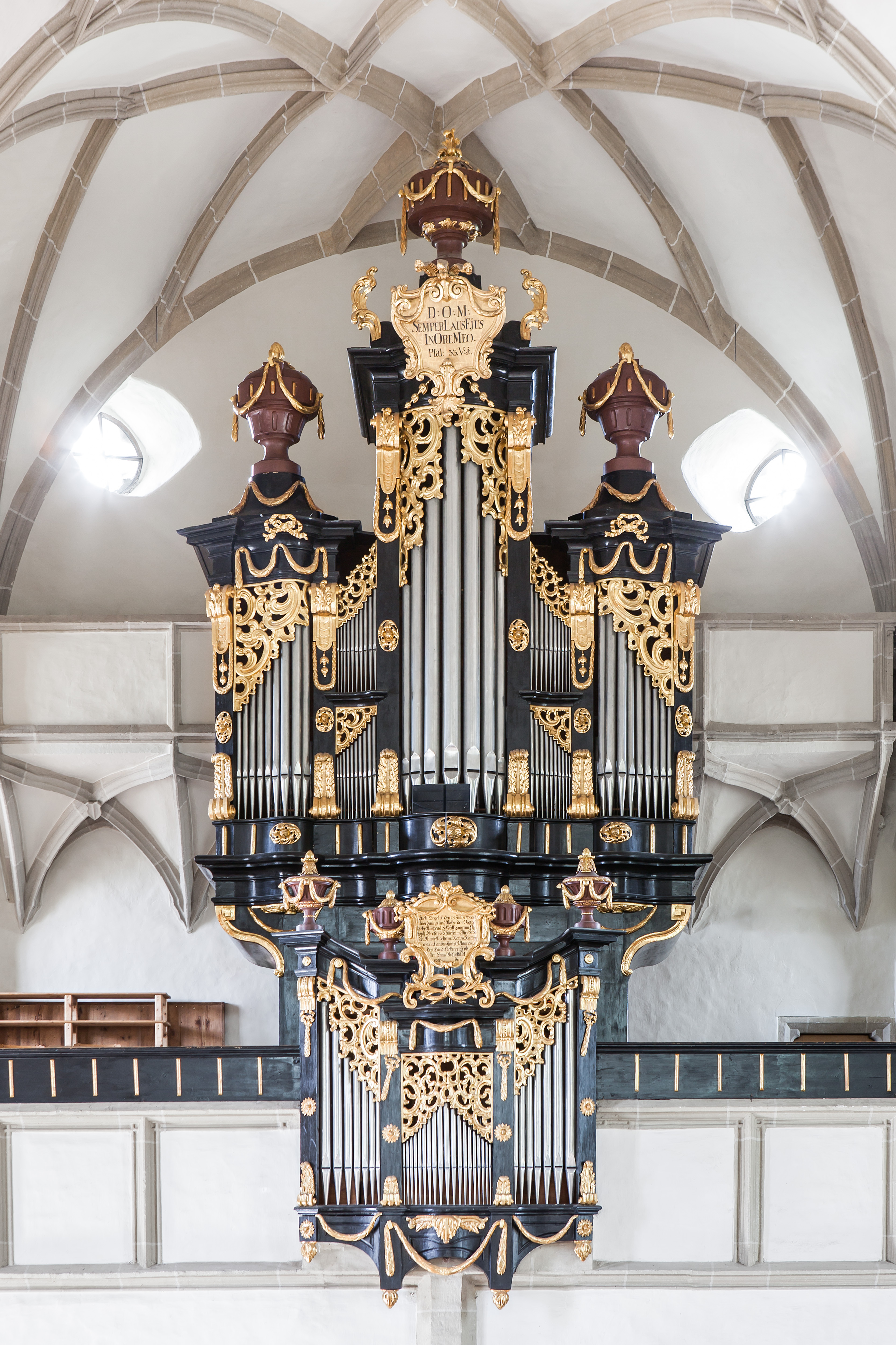 Die 1778 vom Freistädter Orgelbauer Franz Lorenz Richter umfasst 16 Register und 903 Pfeifen.